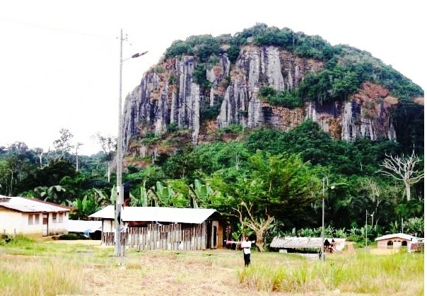 Les deux rochers à Medouneu (Gabon)